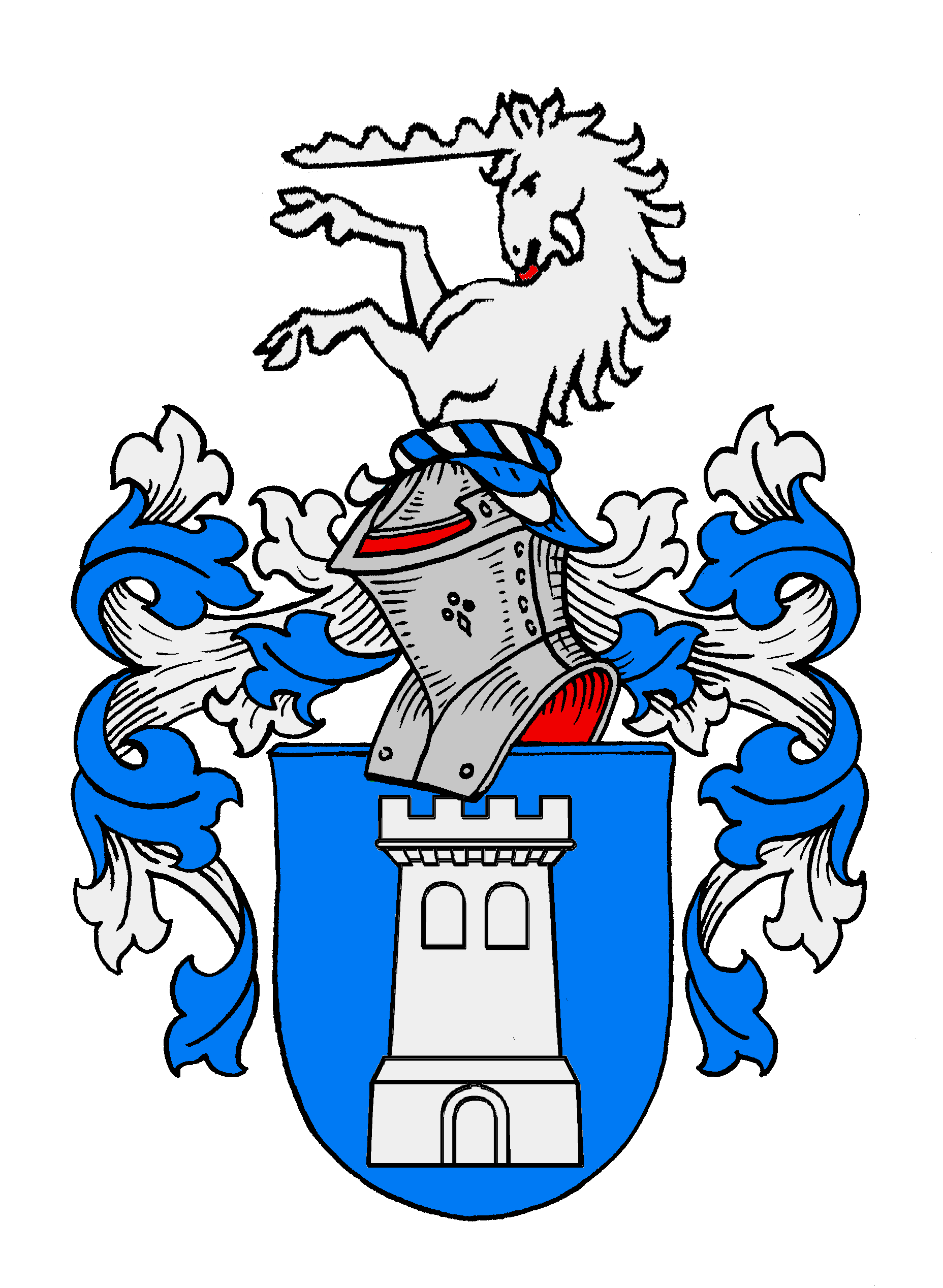 Stammwappen II der Dellingshausen, aus dem Solling stammendes Geschlecht, 1411 urk. mit Cord Dellinghusen, Bürger zu Einbeck, in Reval mit Hinrik Dellingkhusen, urk. 1479—1511, Kaufmann und Ältermann der Großen Gilde, mit dem die Stammreihe beginnt. Schwed. Adelsstand 1680; HRR-Adelsstand und Freiherrenstand 1785